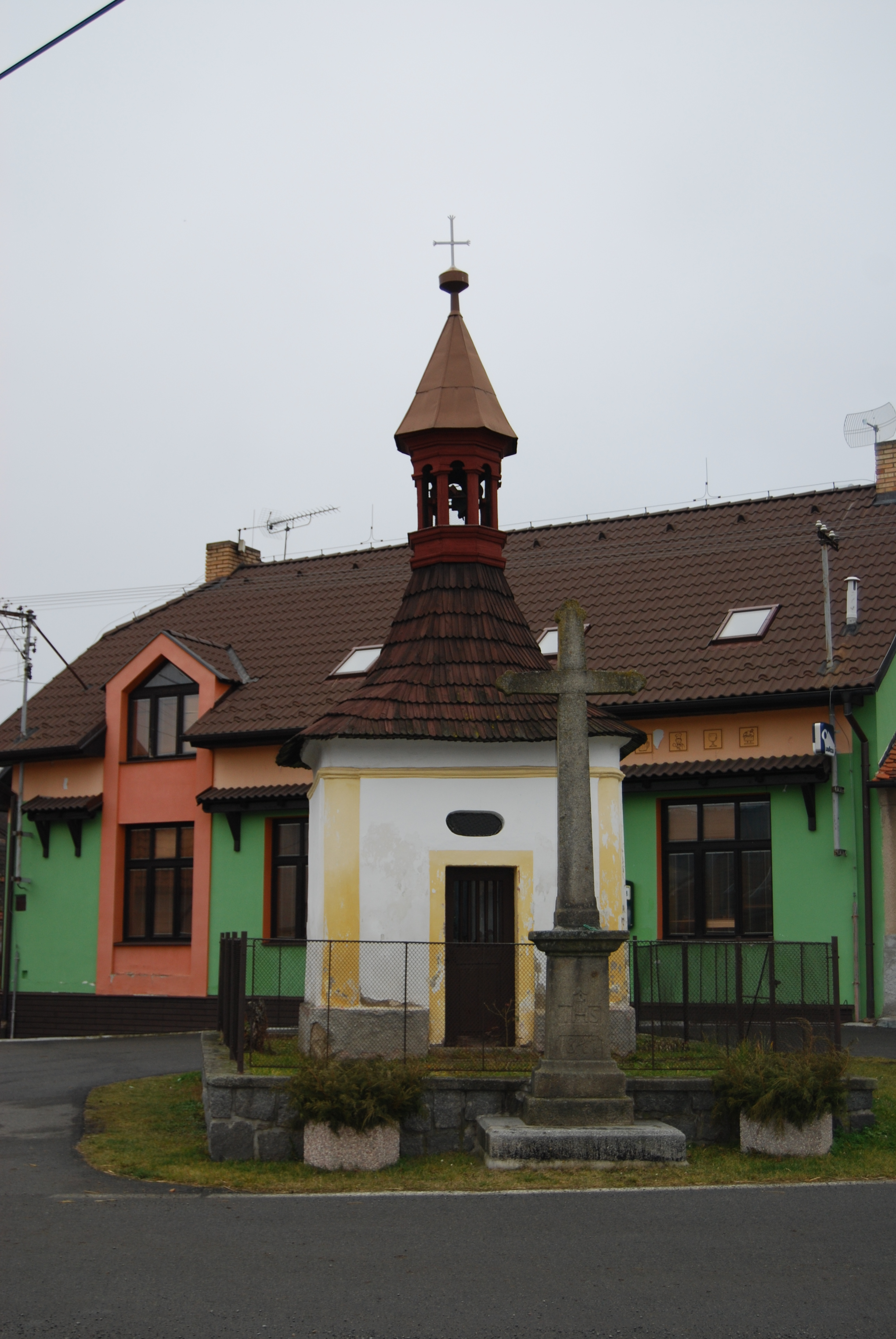 Kaple a kříž z roku 1847 přímo v obci. Rovina (Počepice). Okres Příbram. Česká republika.